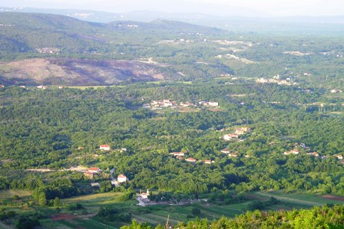 Selo Tihaljina,Grude,zračna snimka